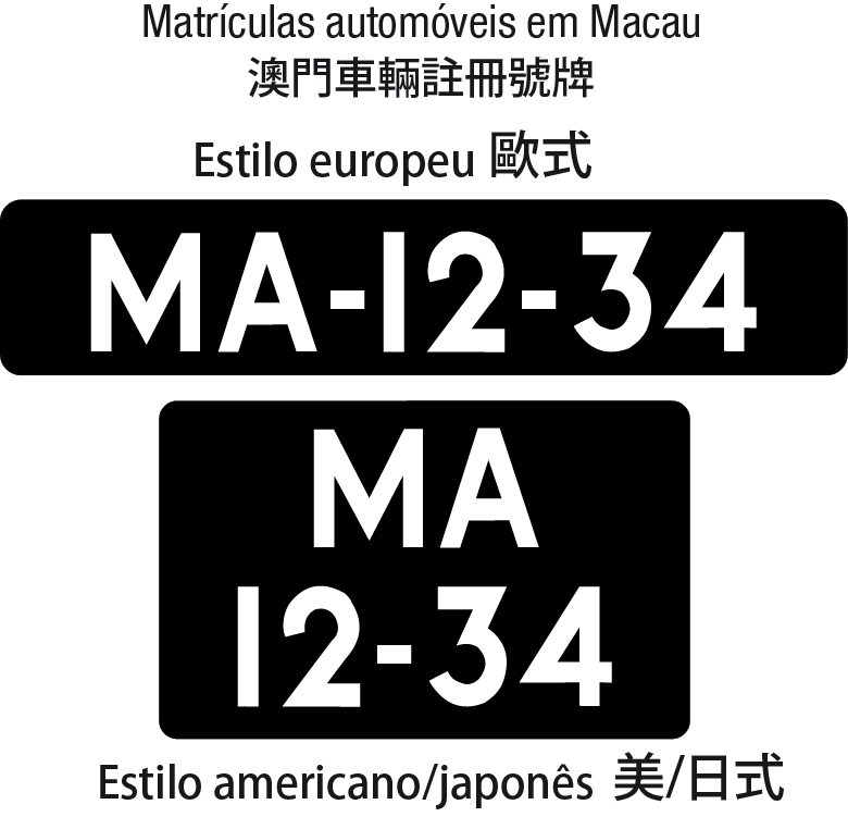 macau licence plates pte cars